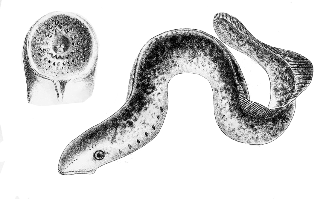 Petromyzon marinus